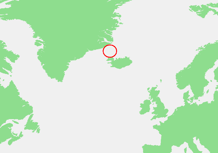 Denemarkenstraat / Denmark Strait